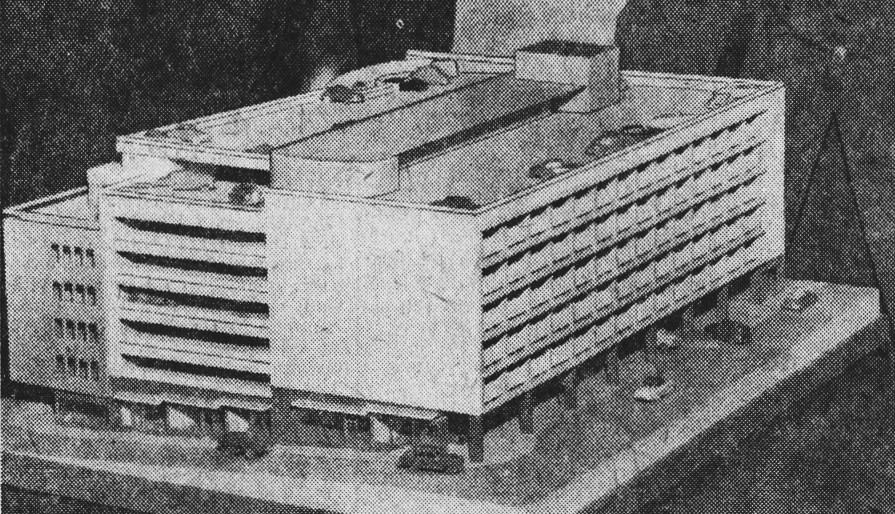 Modellen över parkeringshuset P-Centrum i Stockholm